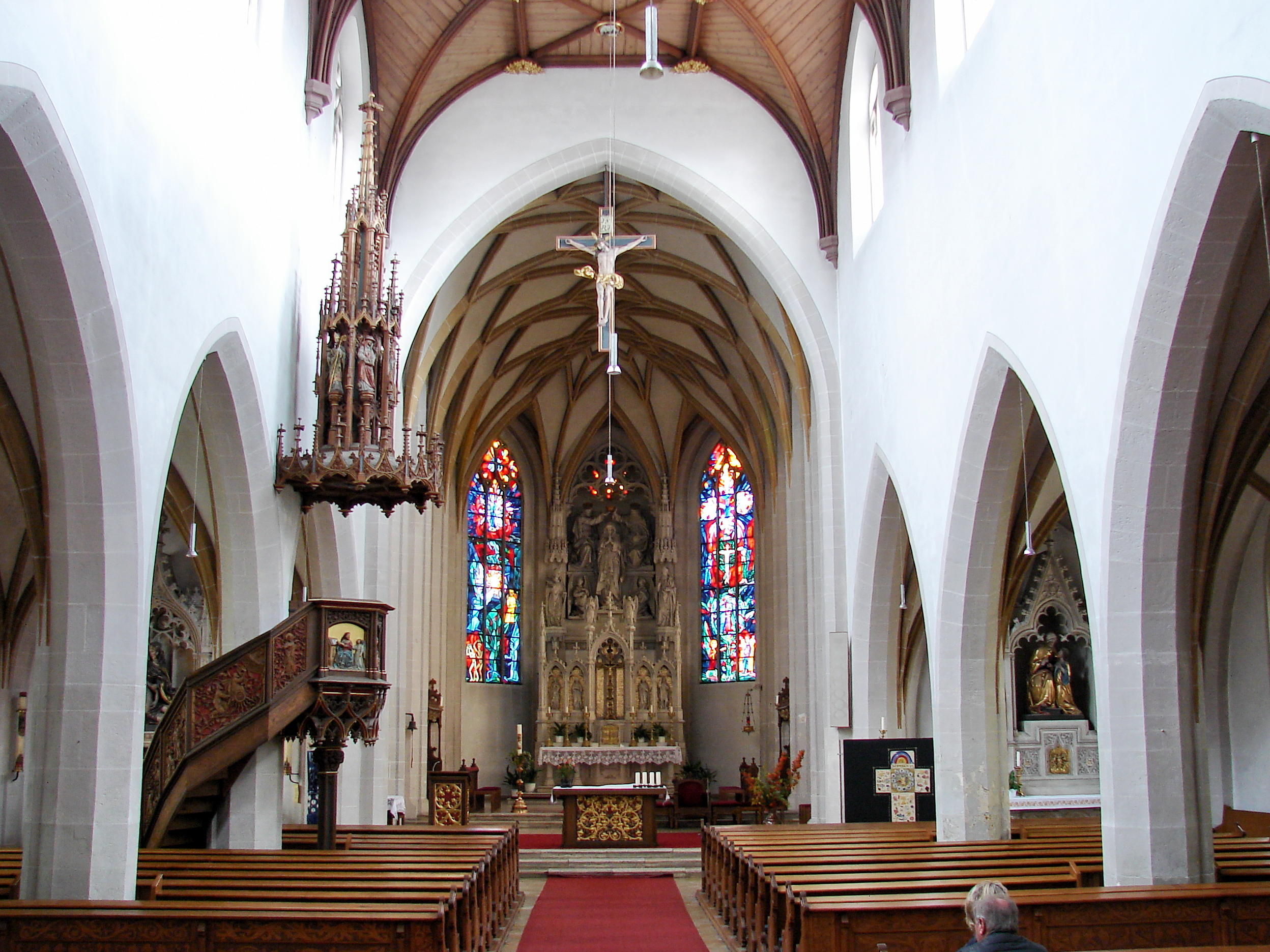 Katholische Pfarrkirche Mariä Himmelfahrt in KelheimThis is a photograph of an architectural monument.